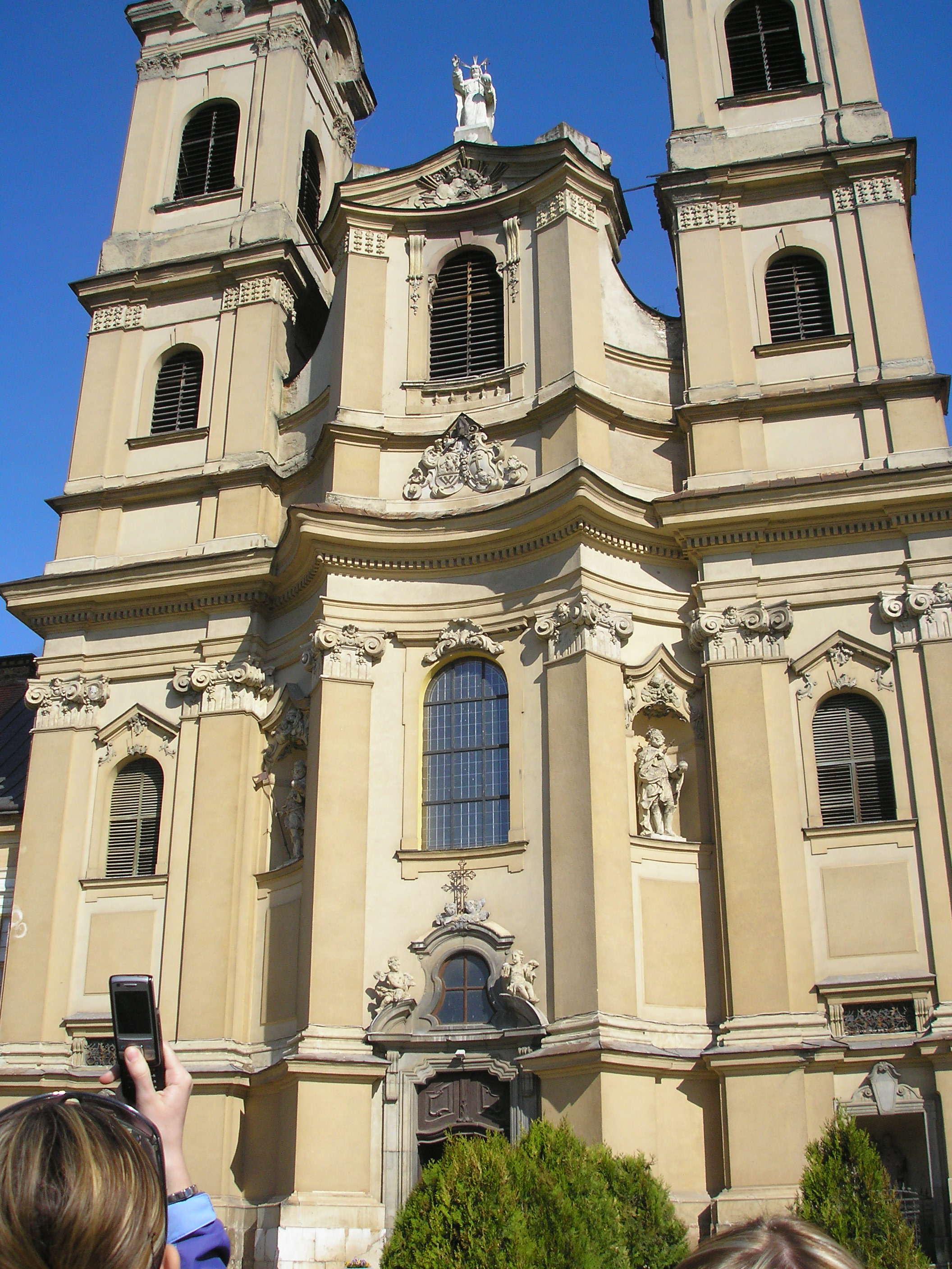 pôvodne gotická stavba z prelomu 12. a 13. storočia v Jasove